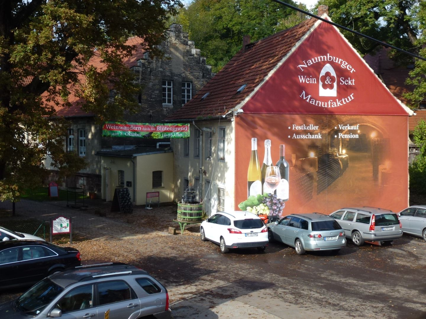 Wein- und Sektmanufaktur in Naumburg